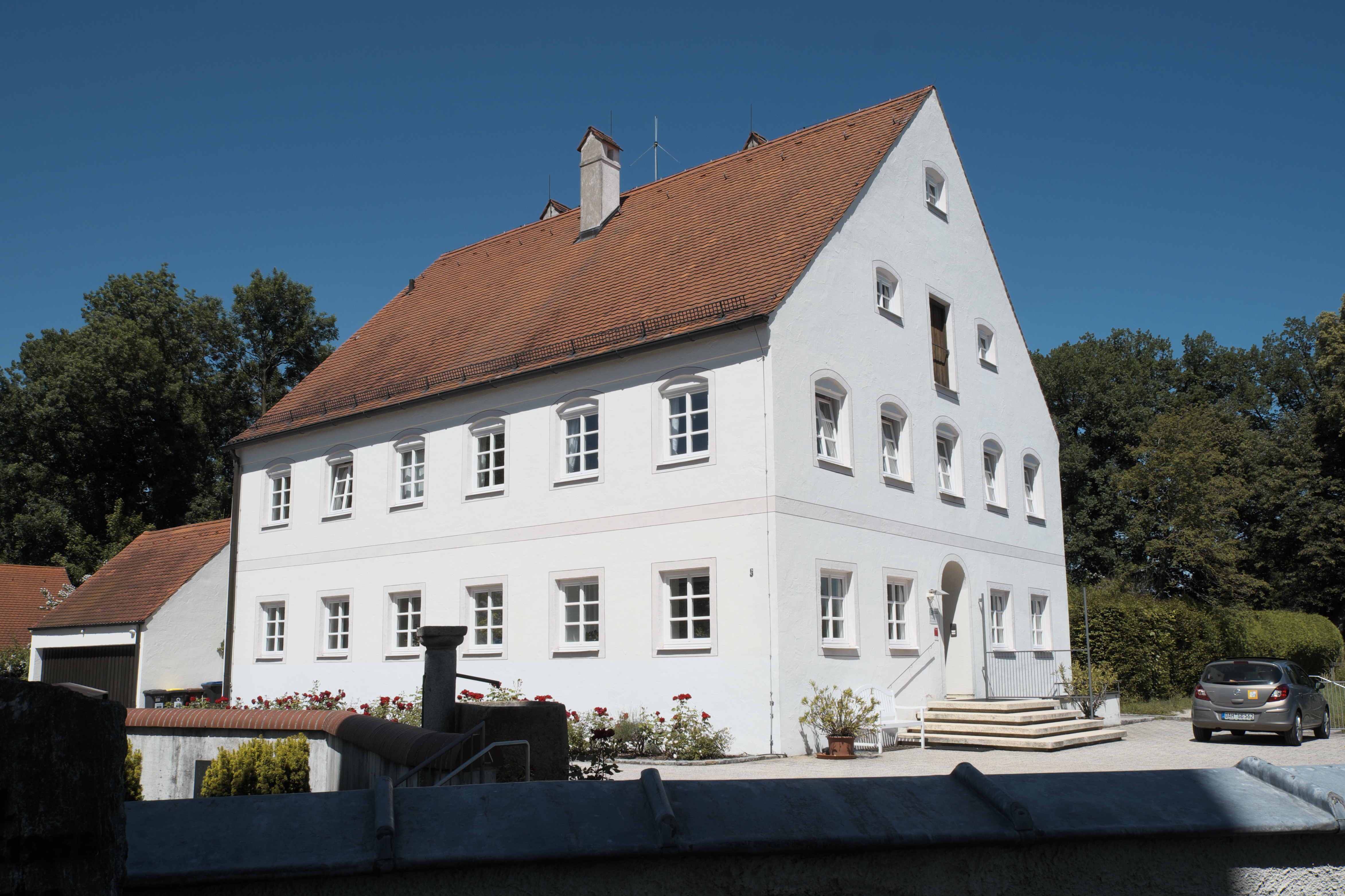 Pfarrhaus in Mitterndorf (Dachau) (Bayern, Deutschland), von Anton Glonner, von 1752